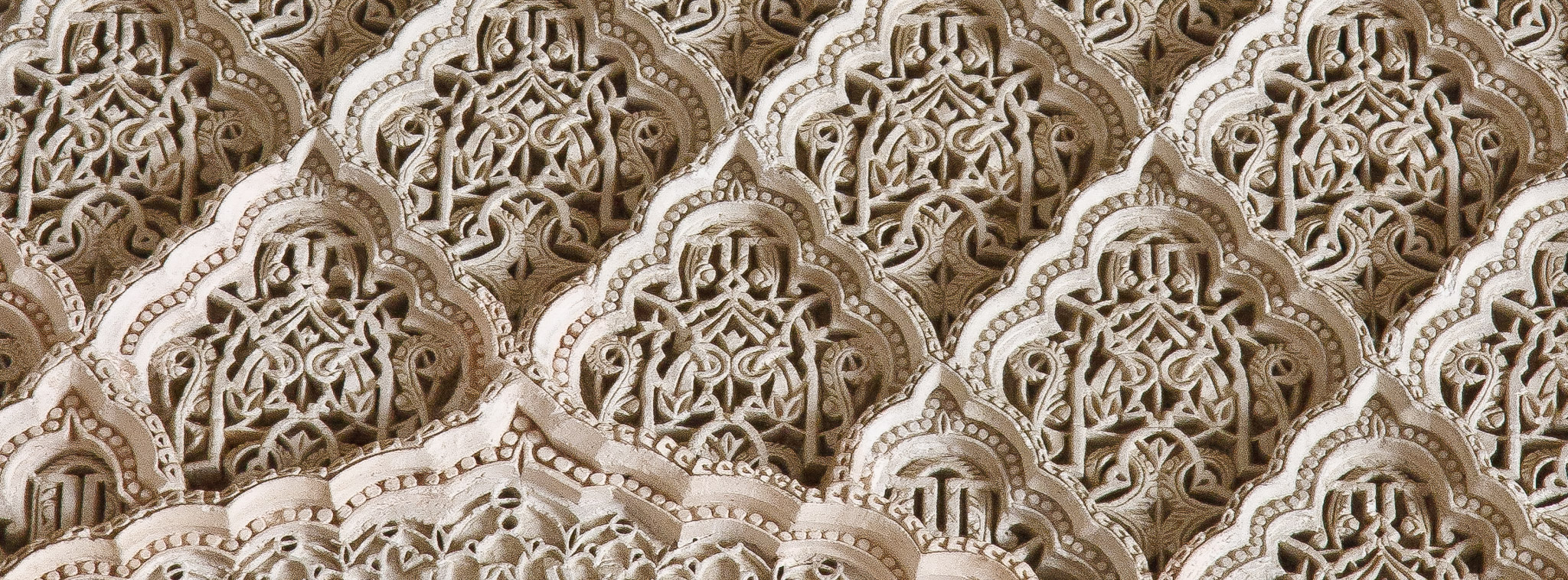 Medersa Bou Inania